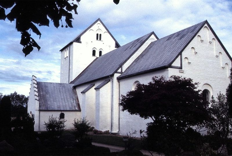 Engum Kirke i Danmark. Engum kirke